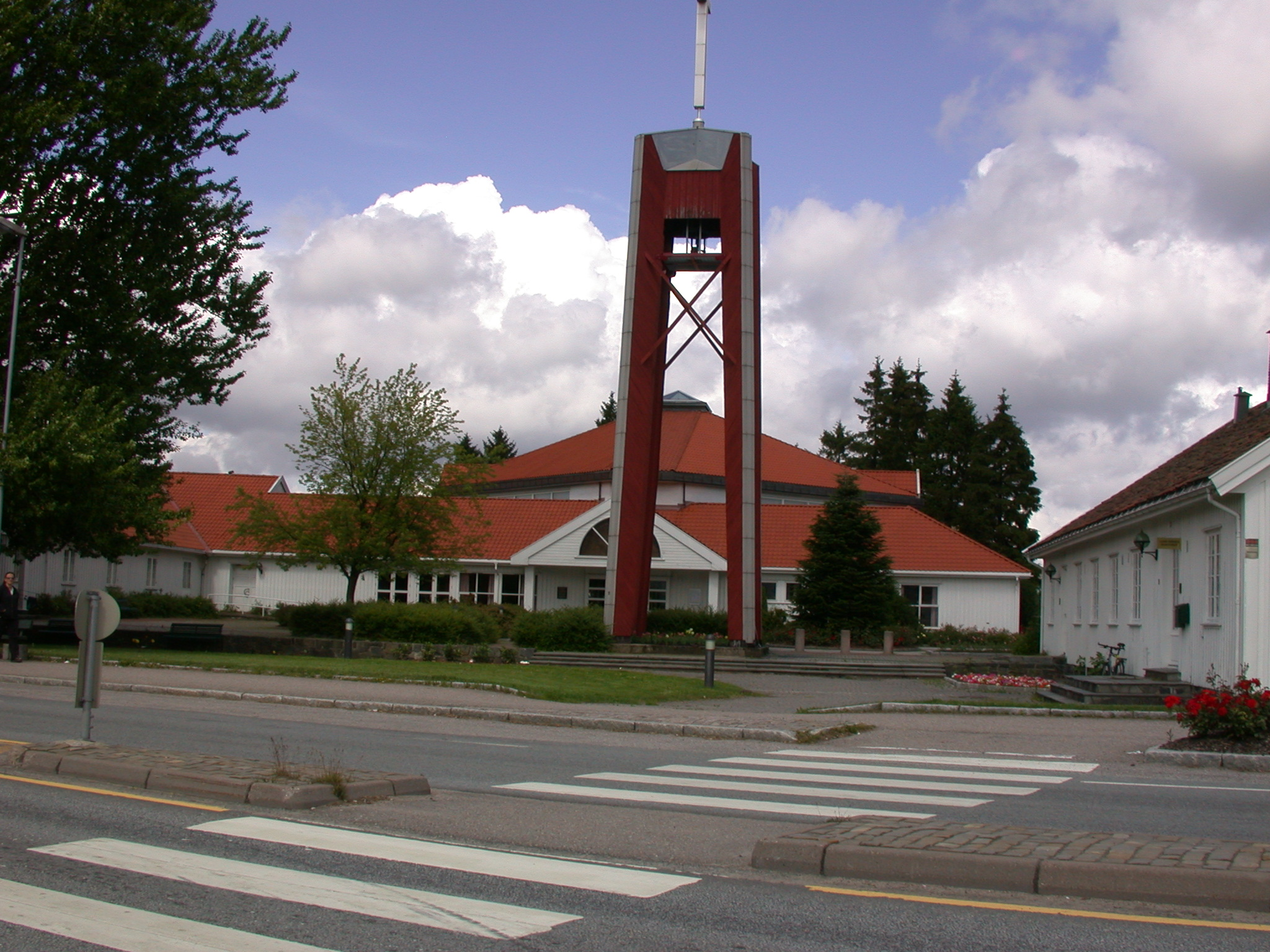 Lund kyrkje i Kristiansand